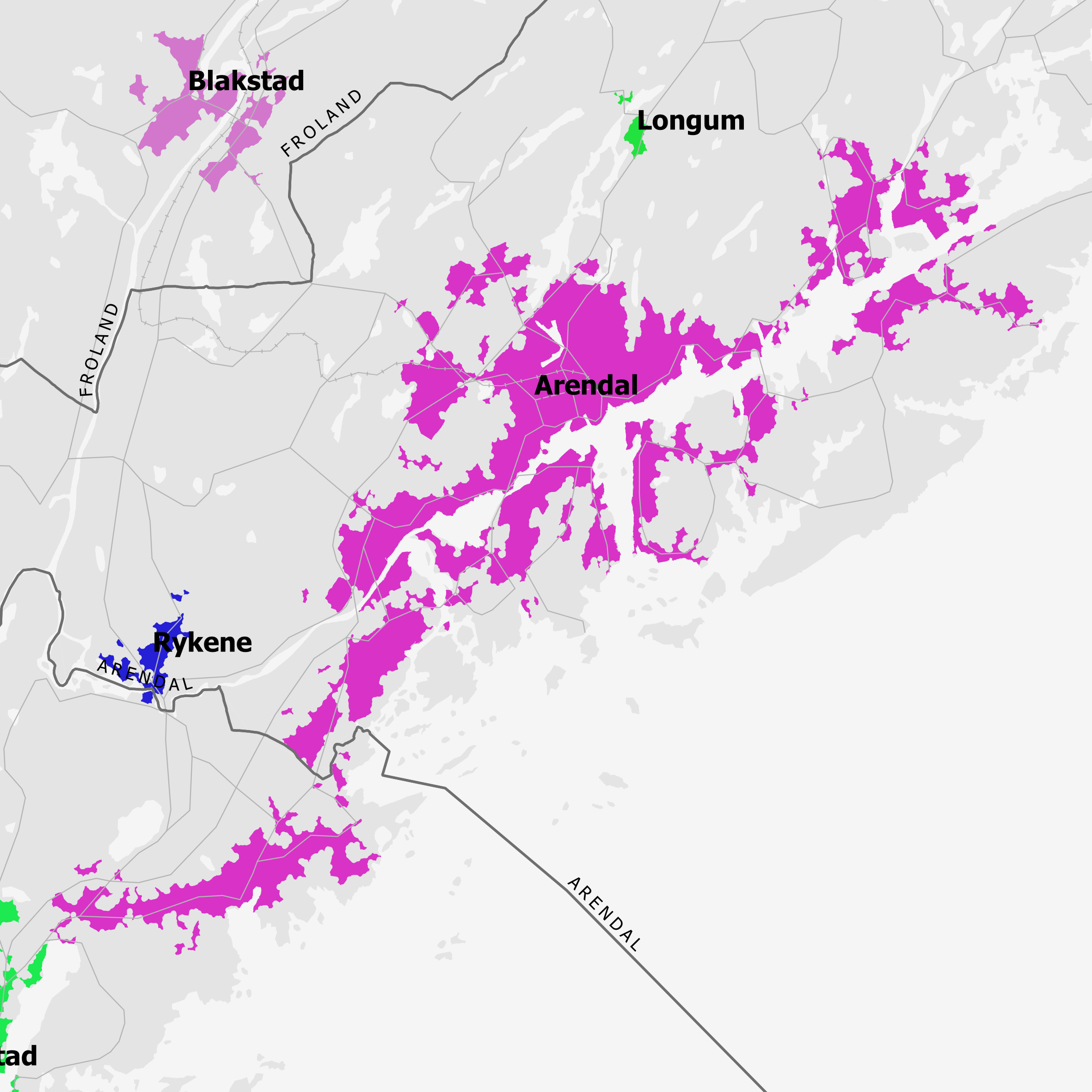 Tettsted 3511 Arendal pr. 1.1.2018